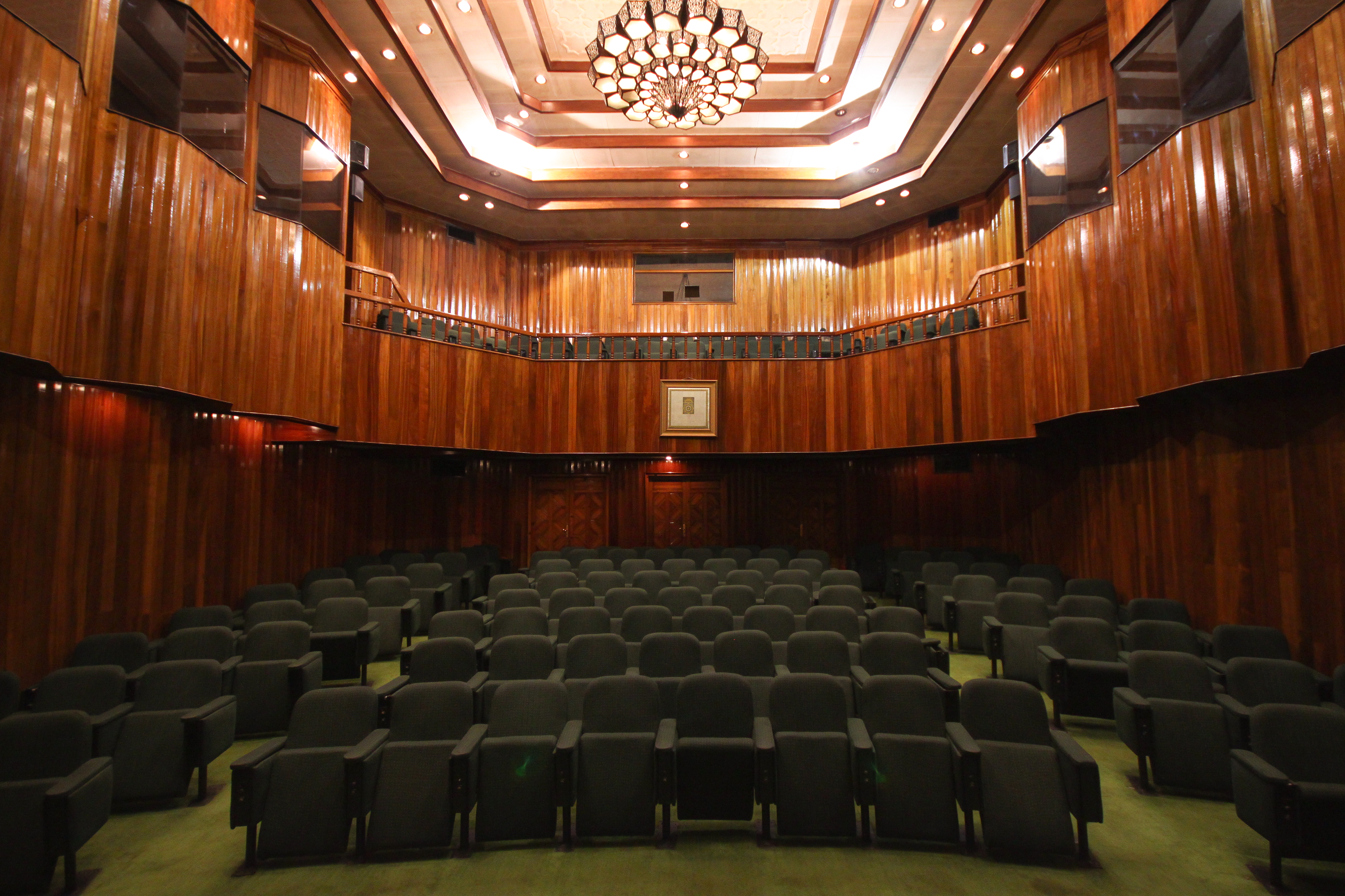 قاعة اجتماعات الشهيد عماد عفت